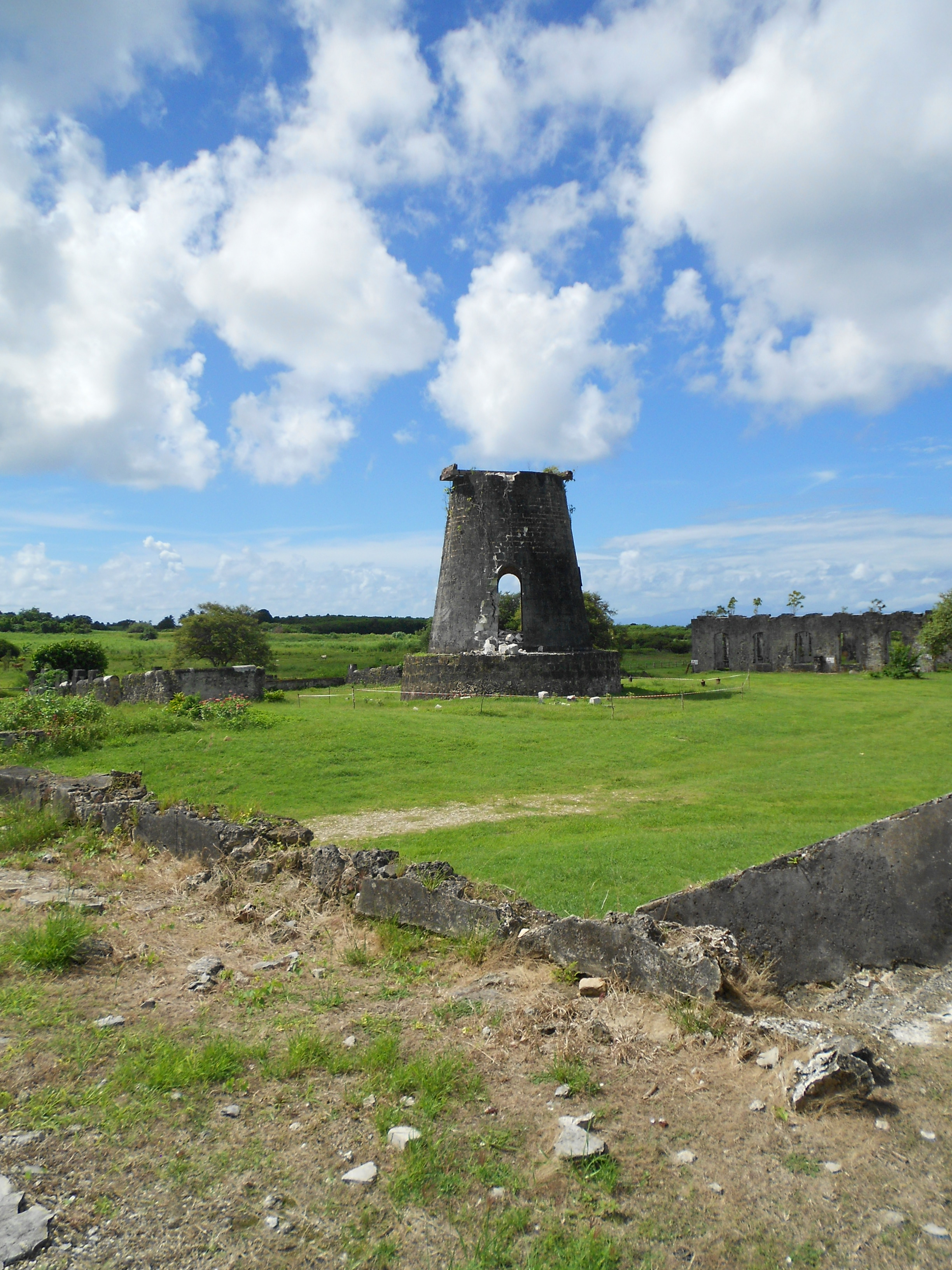 L'habitation Roussel-Trianon est classé Monument Historique